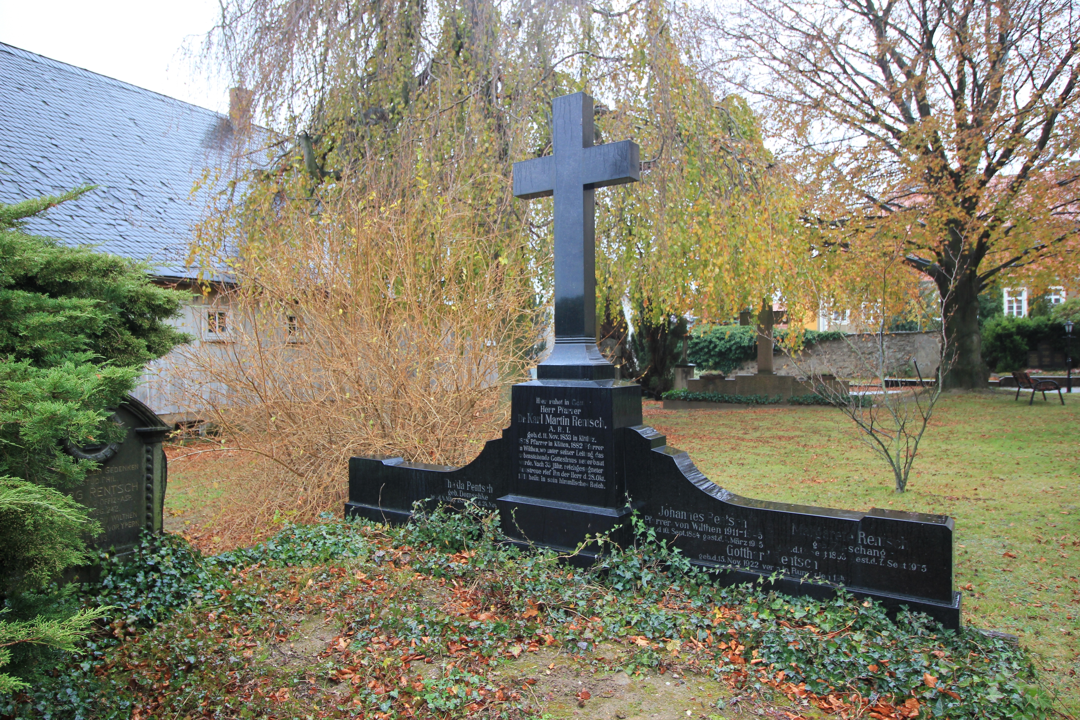 Hornjoserbsce: Row fararja Měrćina Renča při ewangelskej cyrkwi we Wjelećinje